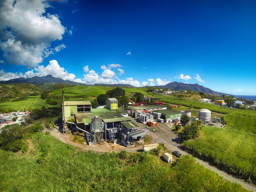 La distillerie des rhums BOLOGNE à Basse-Terre en Guadeloupe